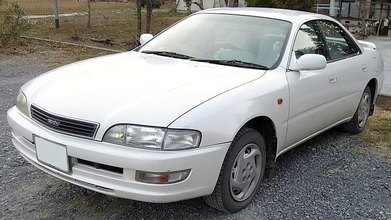 トヨタ・コロナEXiV（2代目・後期, ST200）